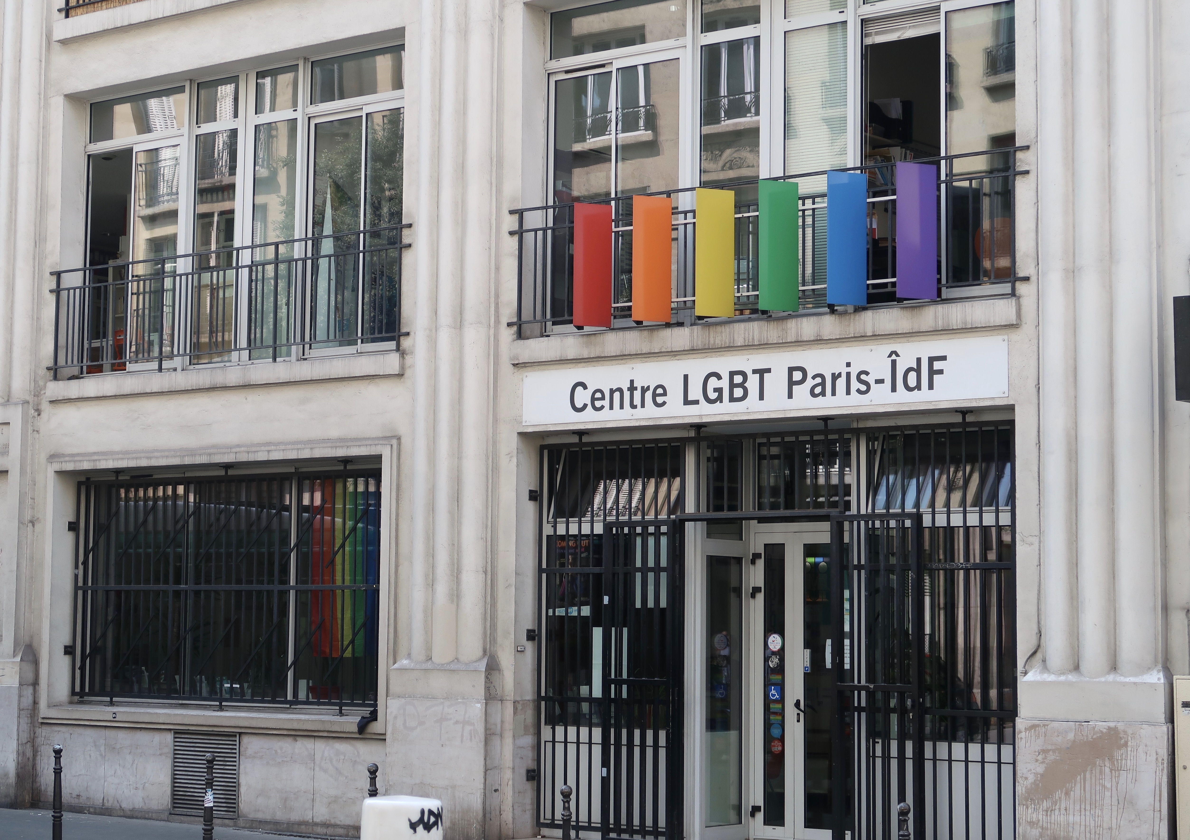 Centre LGBT Paris-ÎdF, 63 rue Beaubourg (Paris, 3e).